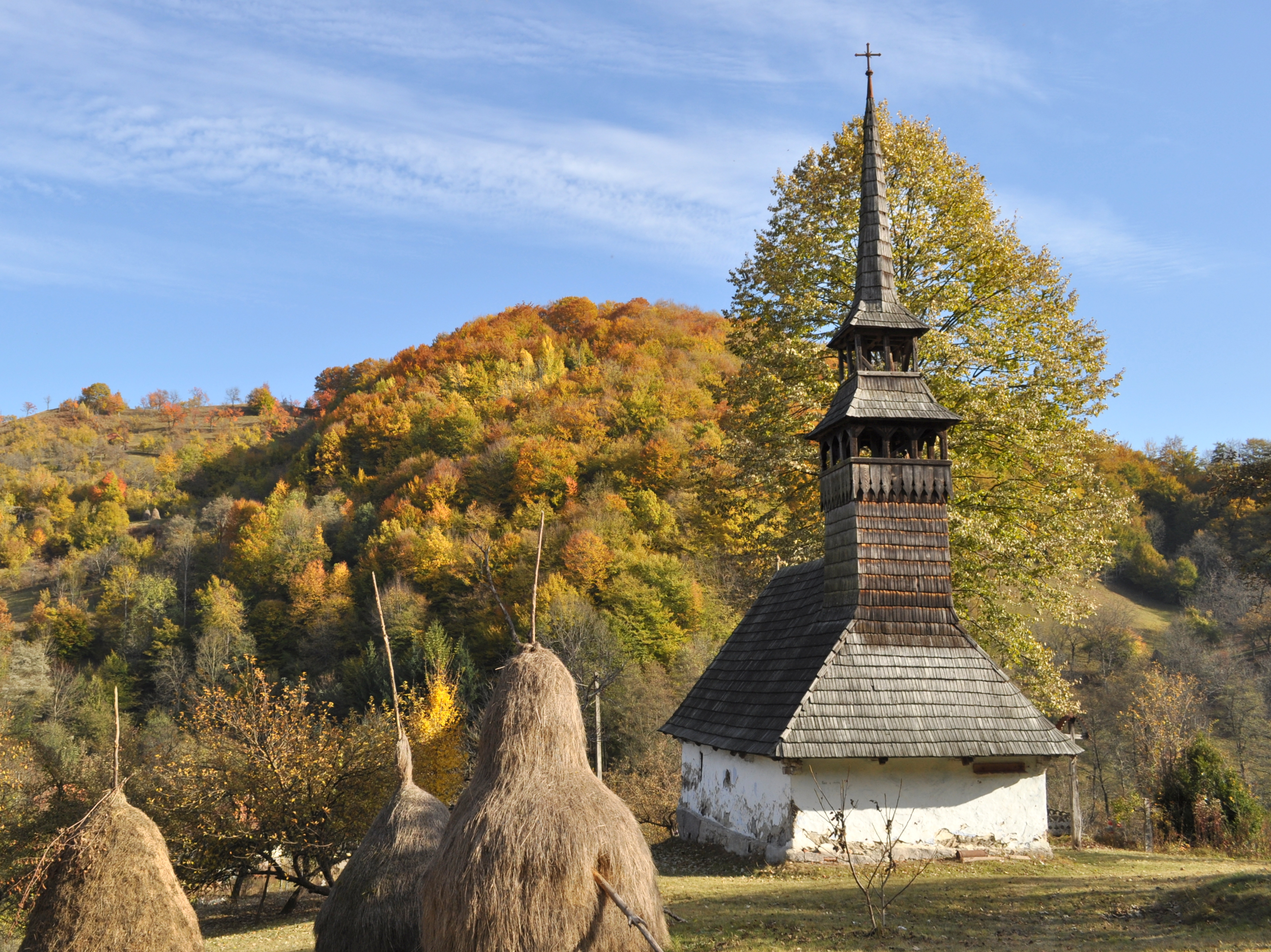 Biserica de lemn „Sfântul Mare Mucenic Gheorghe” din Luncșoara, județul Arad